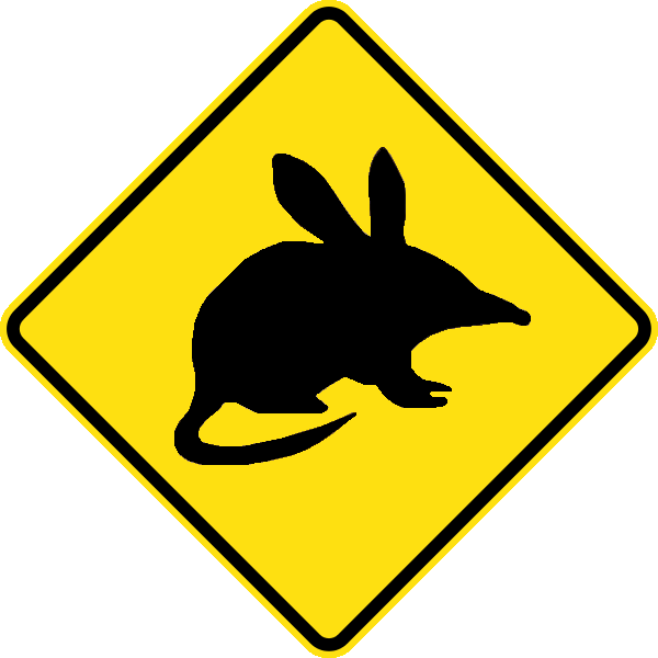 תמרור המתריע מפני חציית בילבי ענק